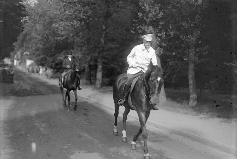 Staatsmänner auf Erholung! Der 81-jährige Präsident der tschechisch-slovakischen Republik Masaryk bei einem seiner täglichen Spazier-Ritte in dem Kurort Karlsbad.